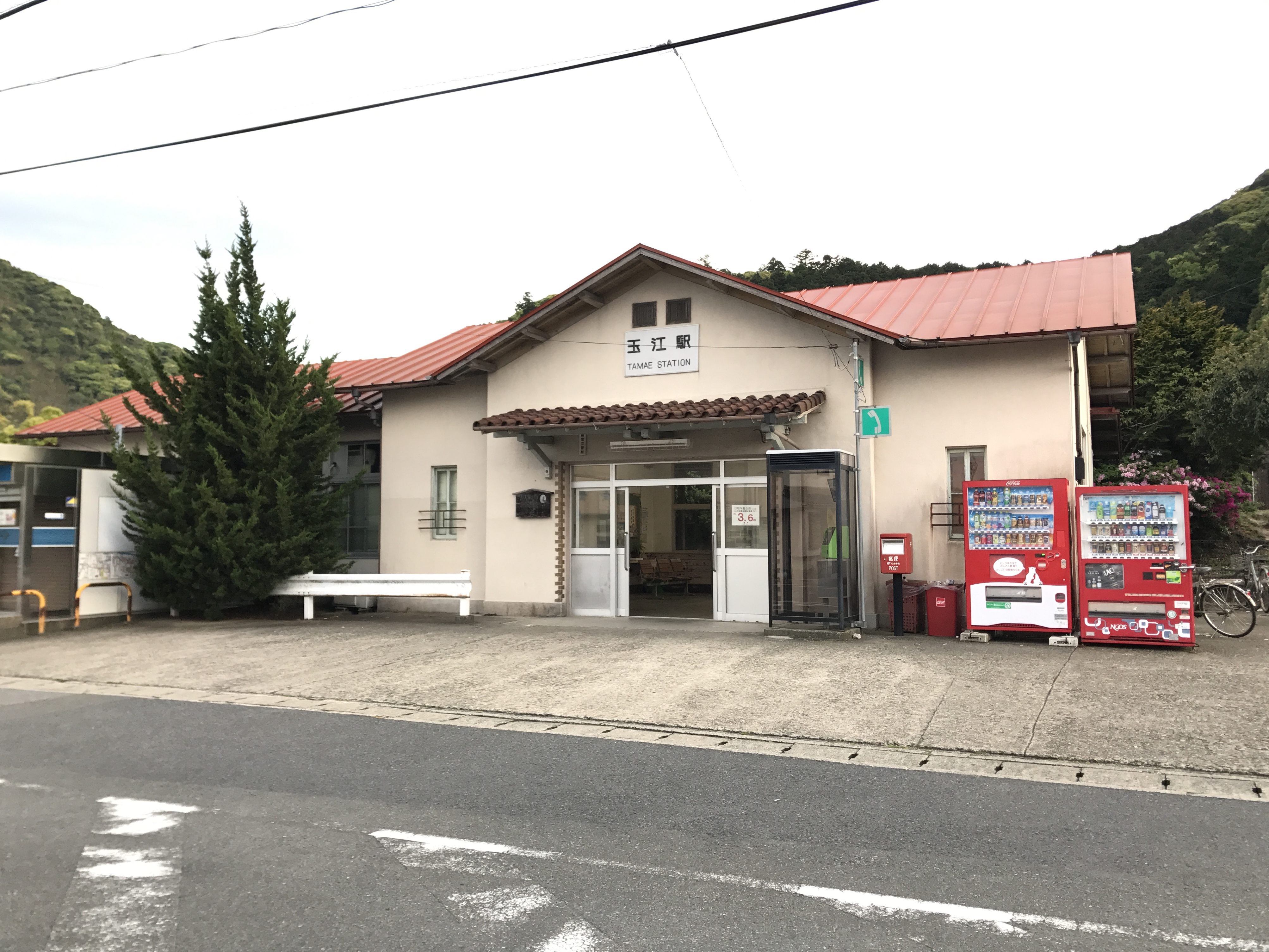 玉江駅駅舎